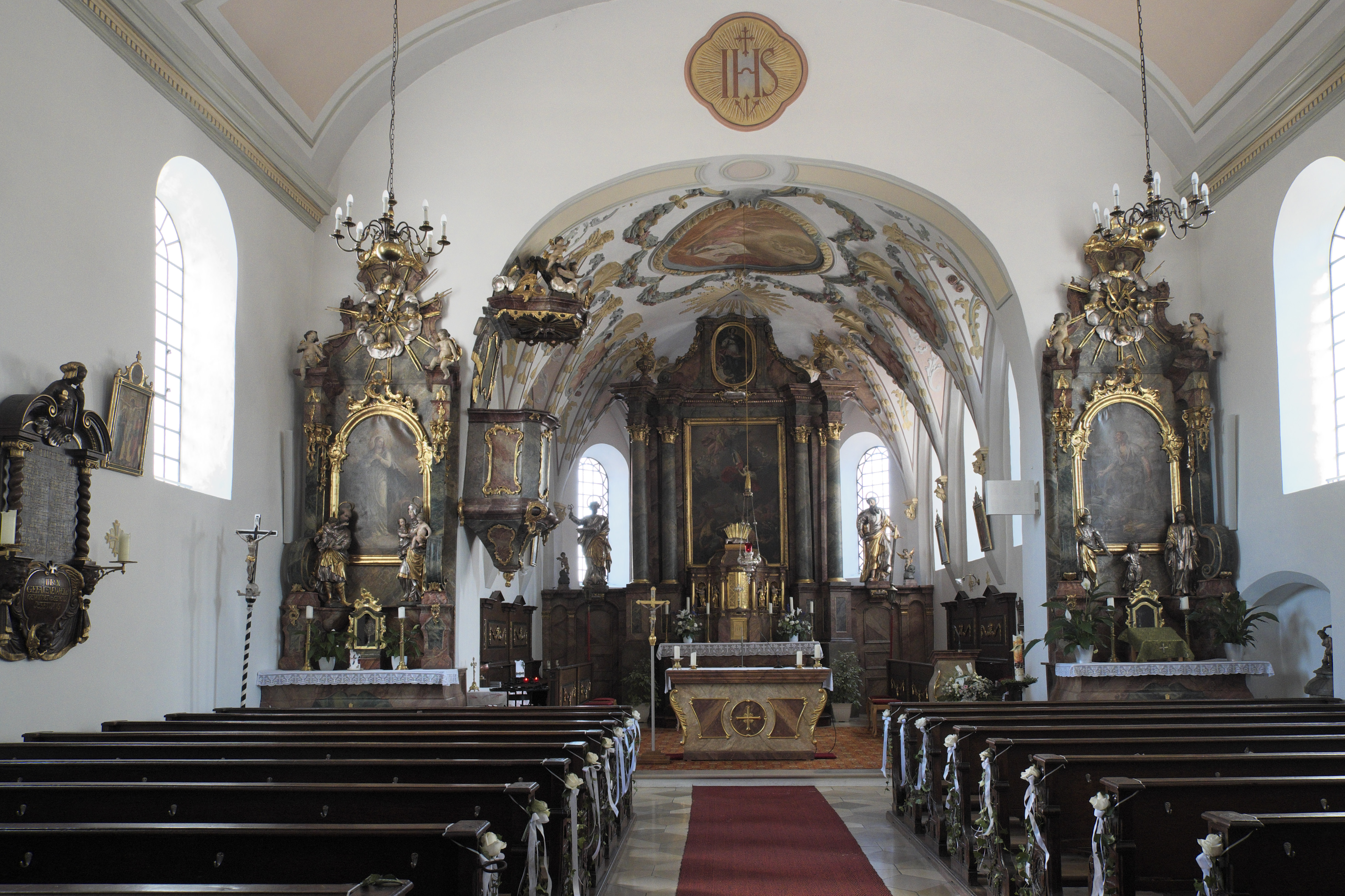 Katholische Pfarrkirche St. Michael in Jesenwang im Landkreis Fürstenfeldbruck (Bayern/Deutschland), Innenraum